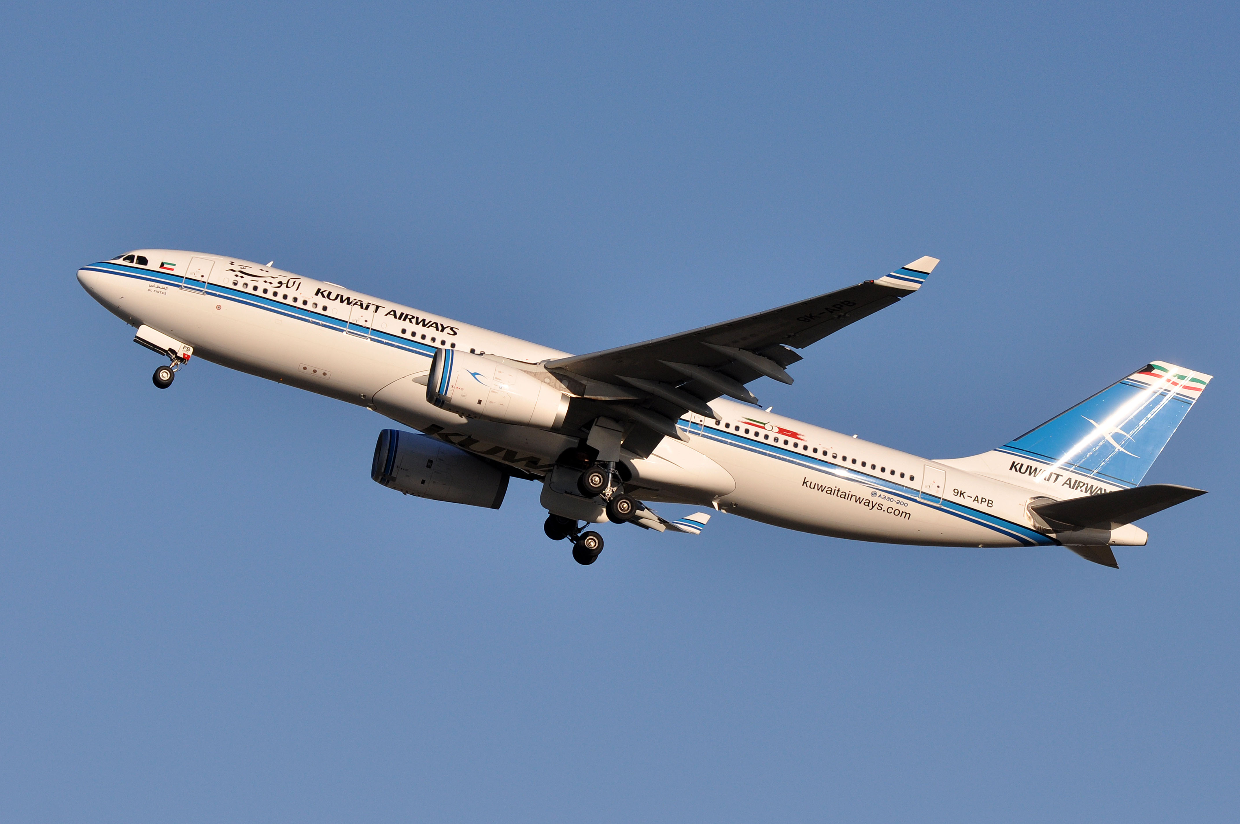 MSN 1643 A330-243 KUWAIT AIRWAYS FCO AIRPORT